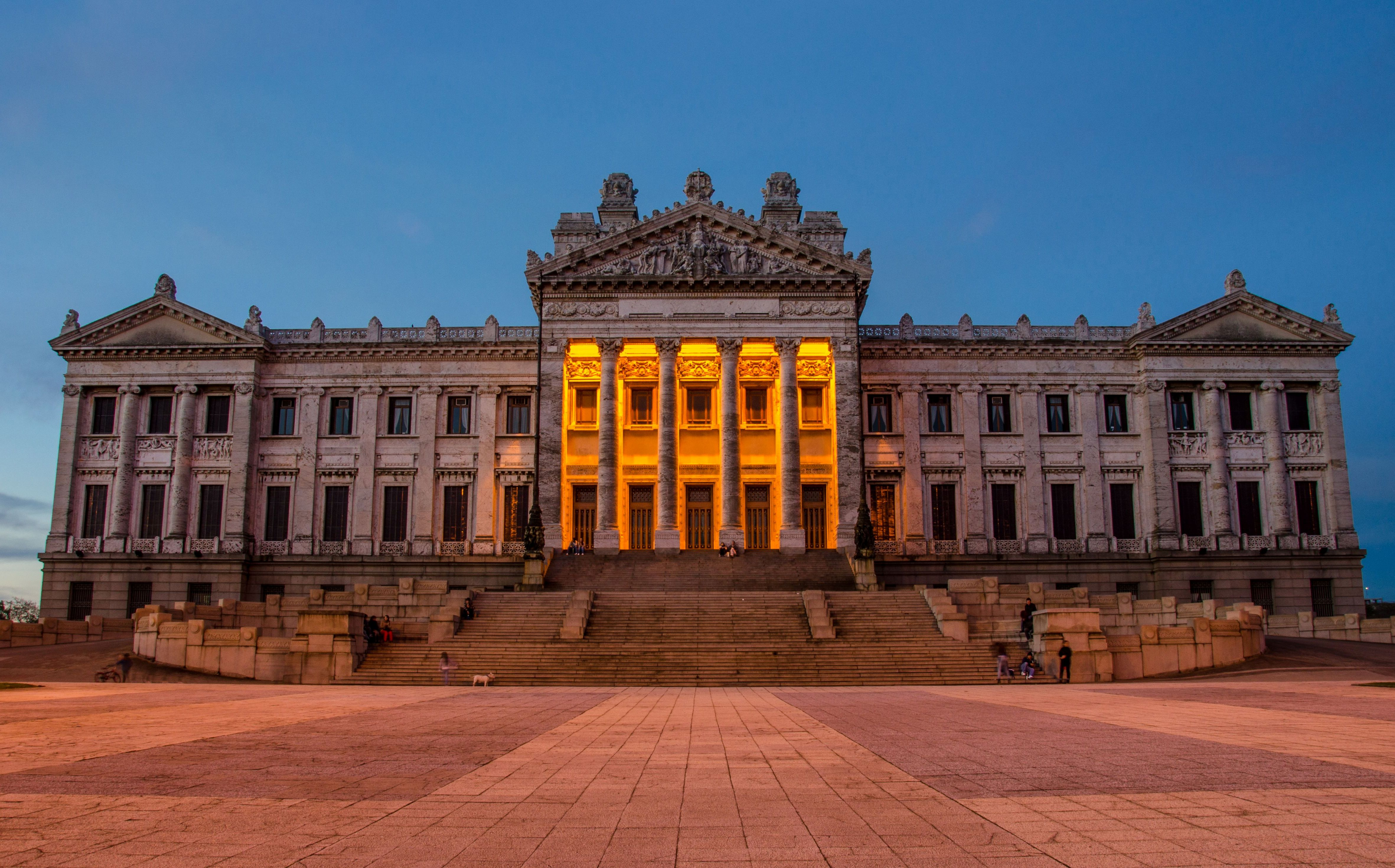 Palacio Legislativo. Ubicada en el departamento de Montevideo